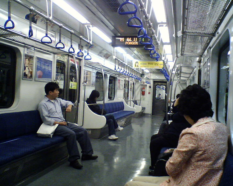 부산 지하철 1호선 전동차